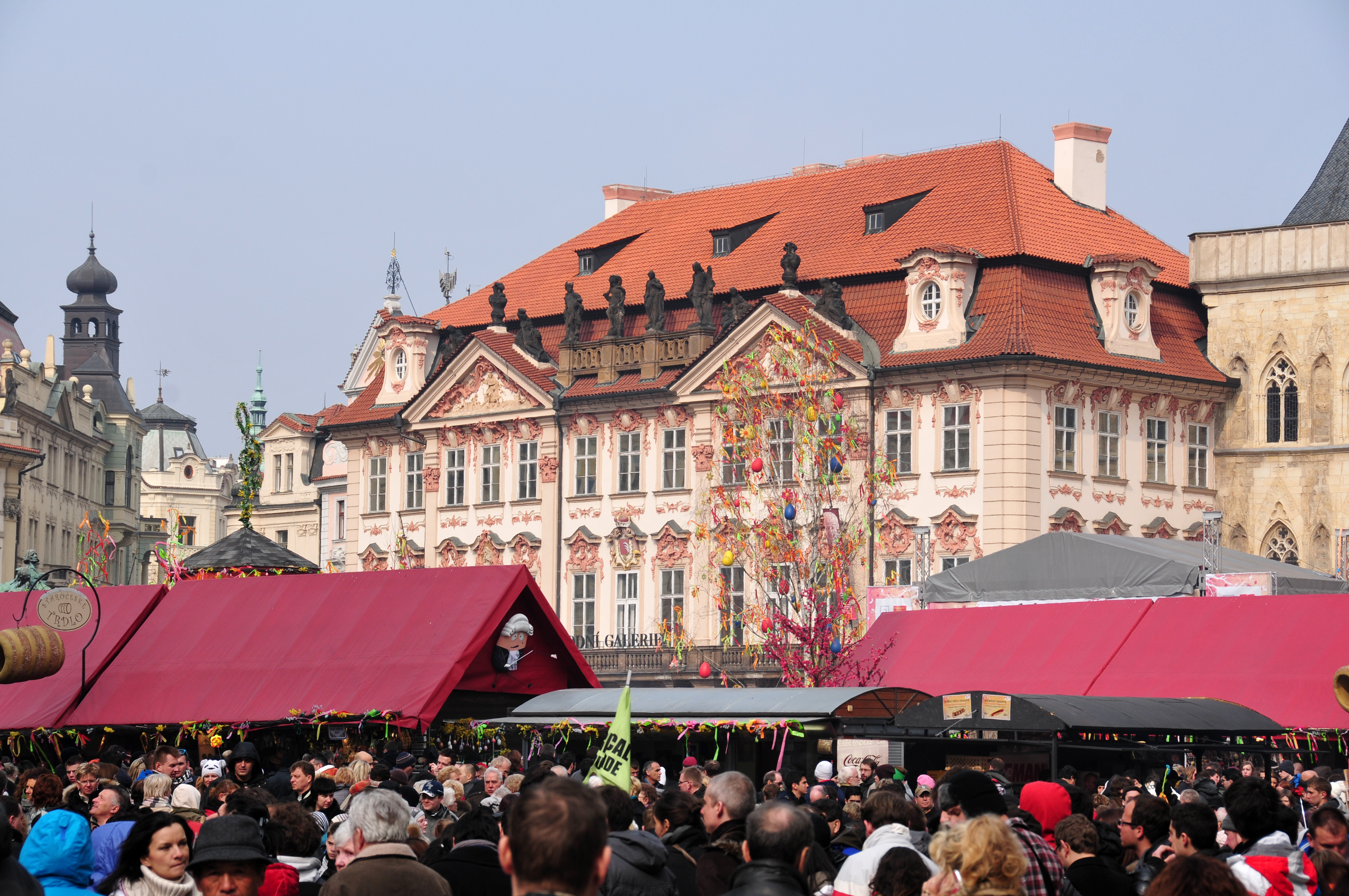 Prag